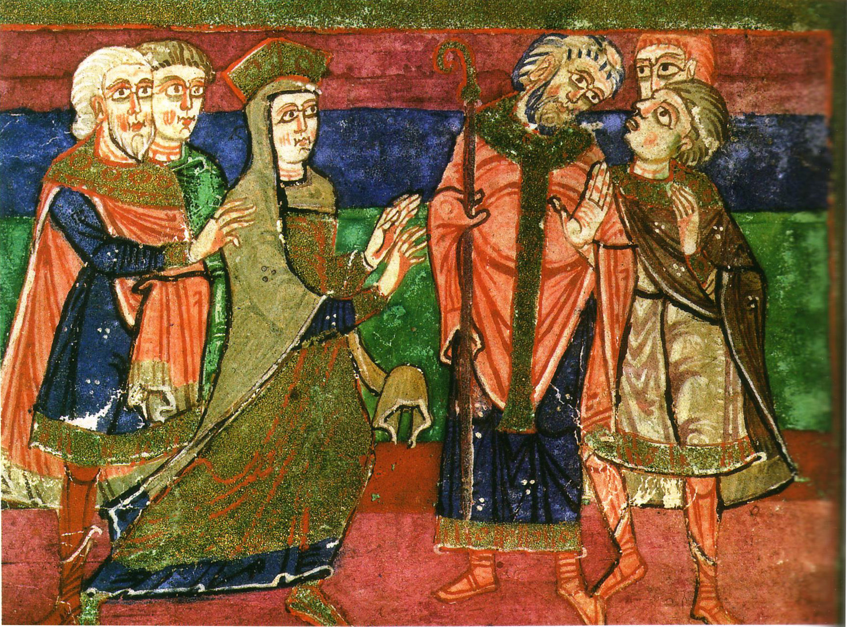 Radegonde souhaite se retirer dans un monastère. Vie de sainte Radegonde, XIème siècle. Bibliothèque municipale de Poitiers.